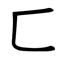 фочжуинь